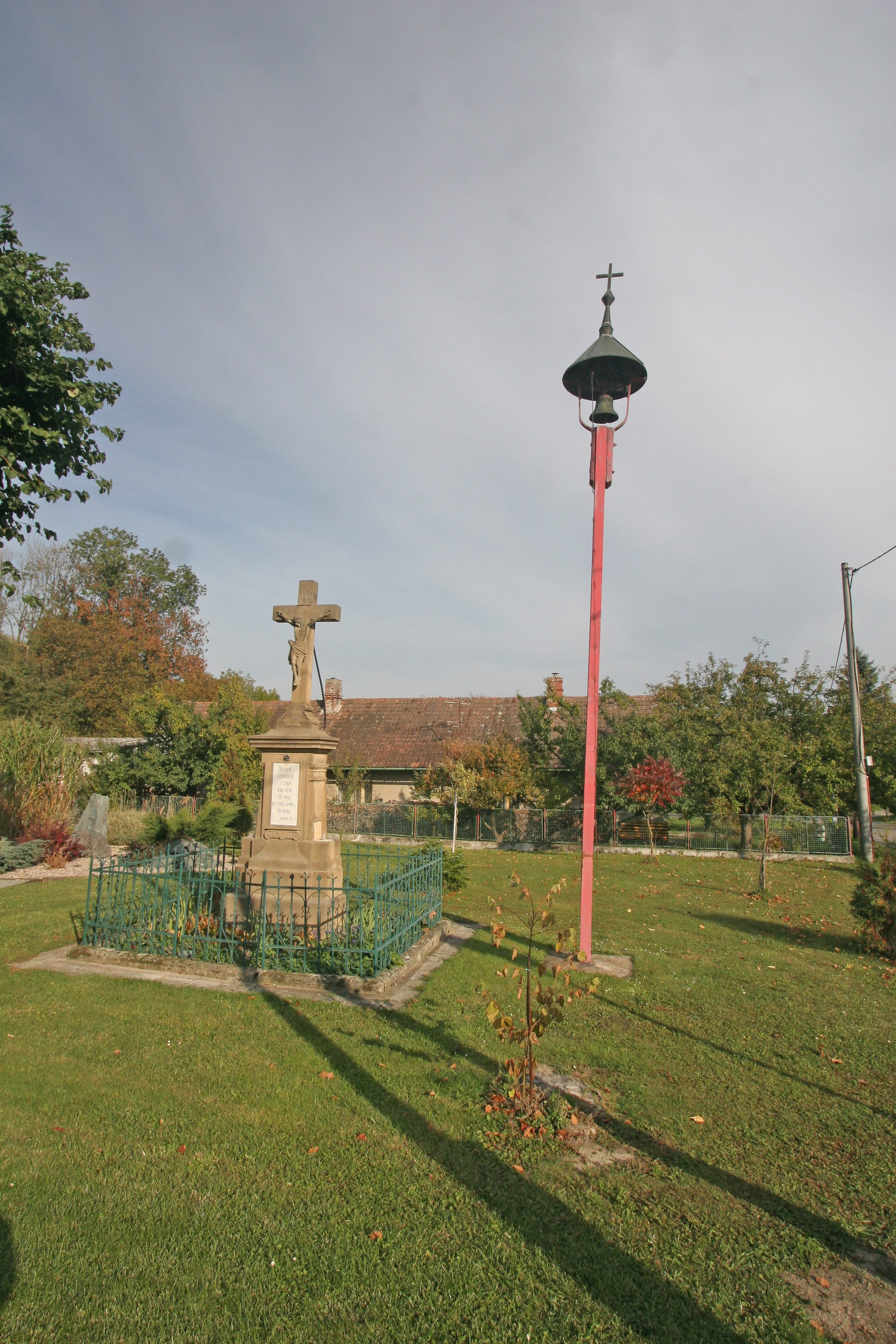 Libníkovice zvonička a křížek